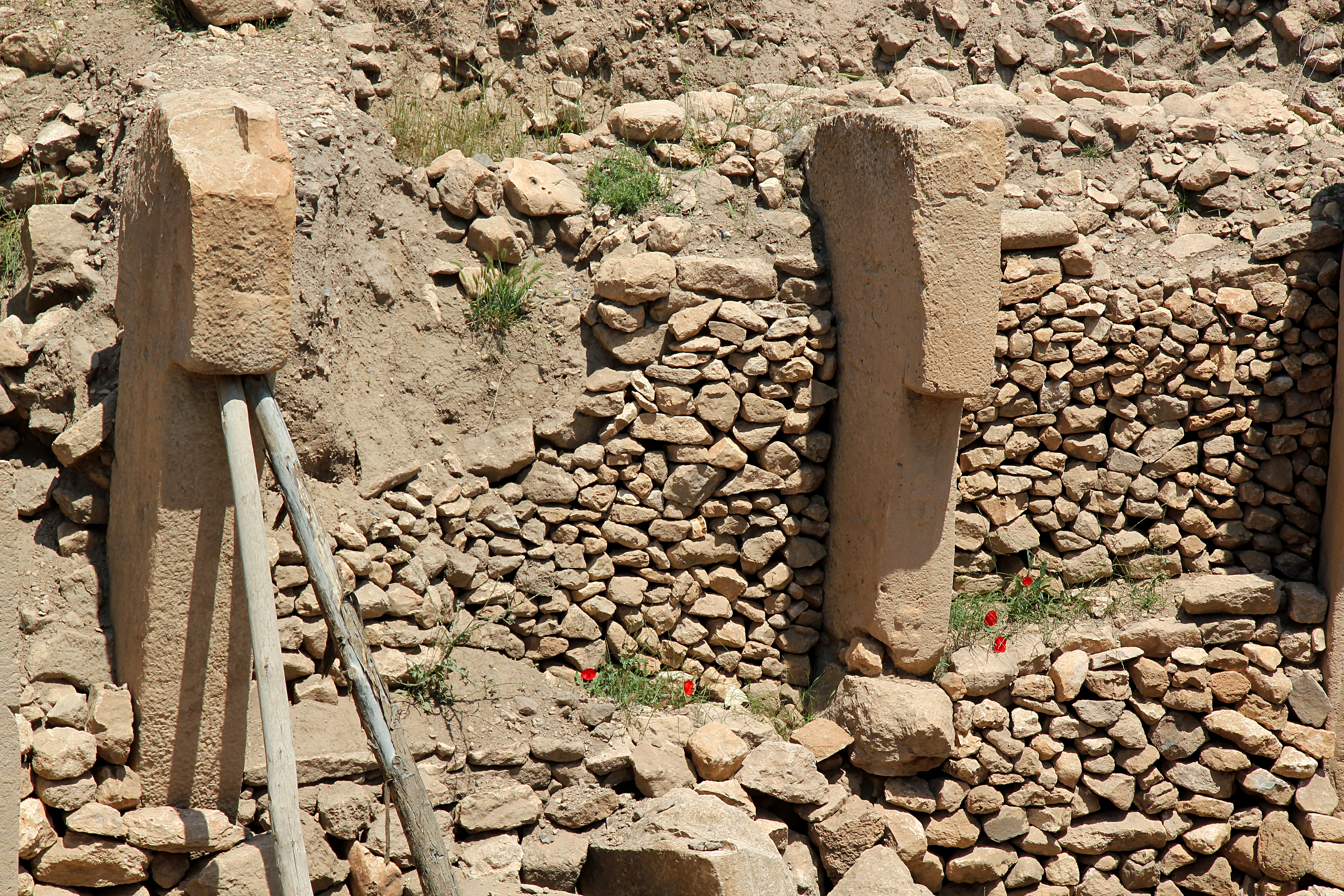 Göbekli Tepe, Siedlungshügel bei Şanlıurfa, Südosttürkei, Anlage C Pfeiler 39 und 28